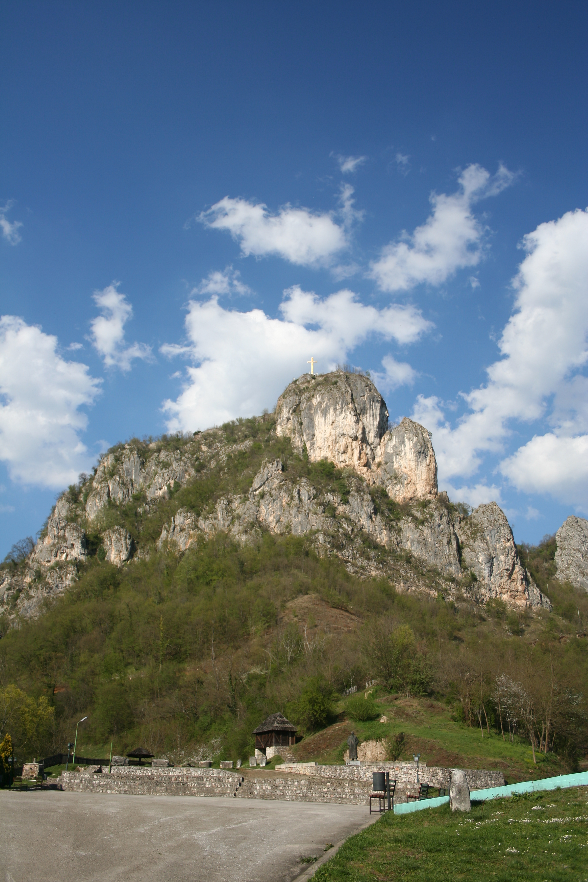 Manastir Svetog Nikolaja - Soko, Ljubovija